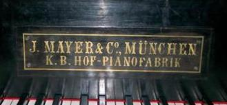 Logo der J.Mayer & Co. Pianoforte Fabrik, ca. 1870